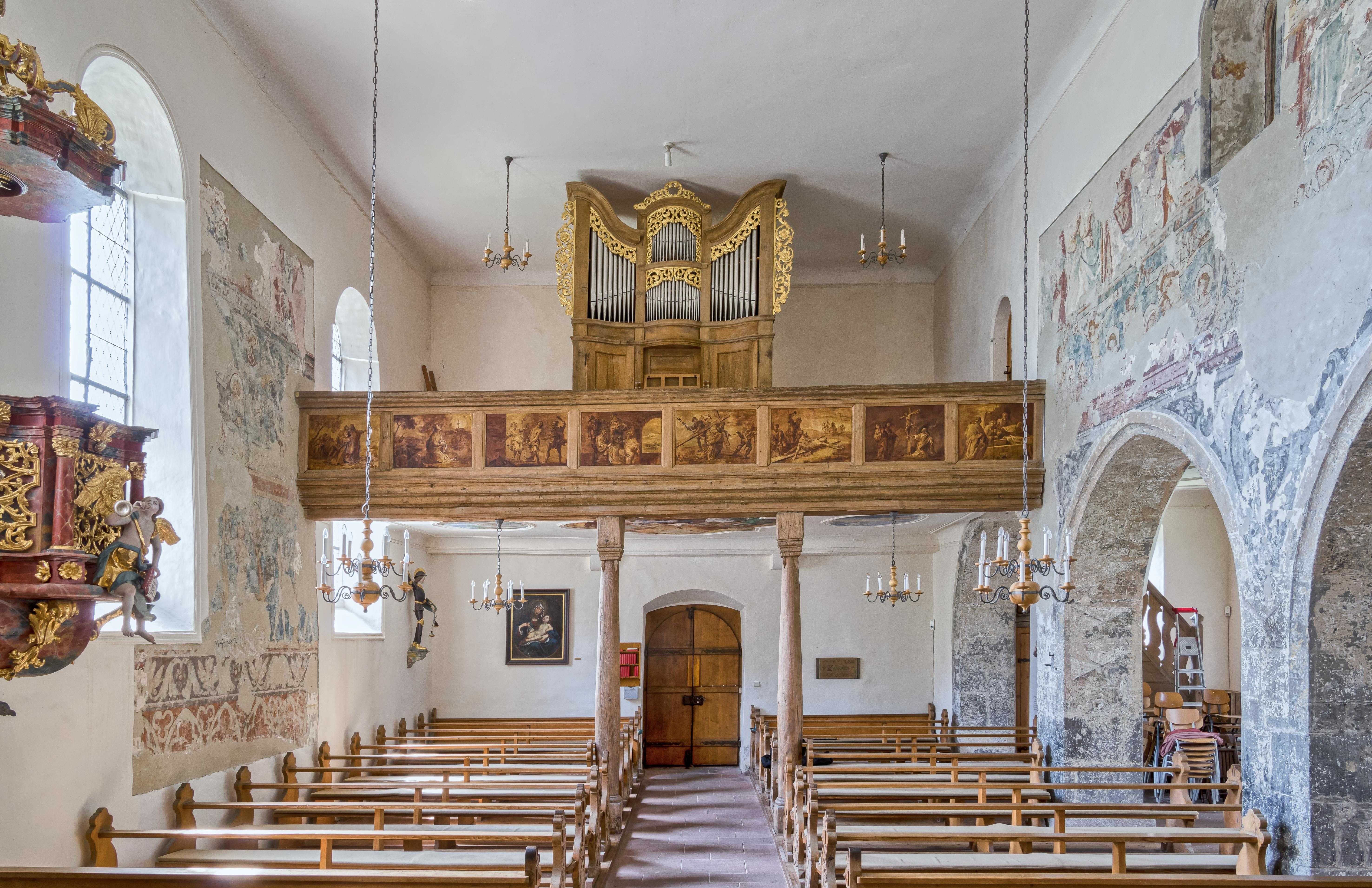 St. Michaelis in Niederrotweil Die Kirche ist einer der ältesten im Breisgau. Entstehung und Frühzeit ist nicht dokumentiert. Die frühromanische Bauform deutet auf das 11. Jahrhundert für dieses Bauwerk. Die erste Urkunde die die Kirche erwähnt stammt aus dem Jahre 1175. Die Kirche liegt am Badischen Teils des Jakobswegs von Rust nach Breisach